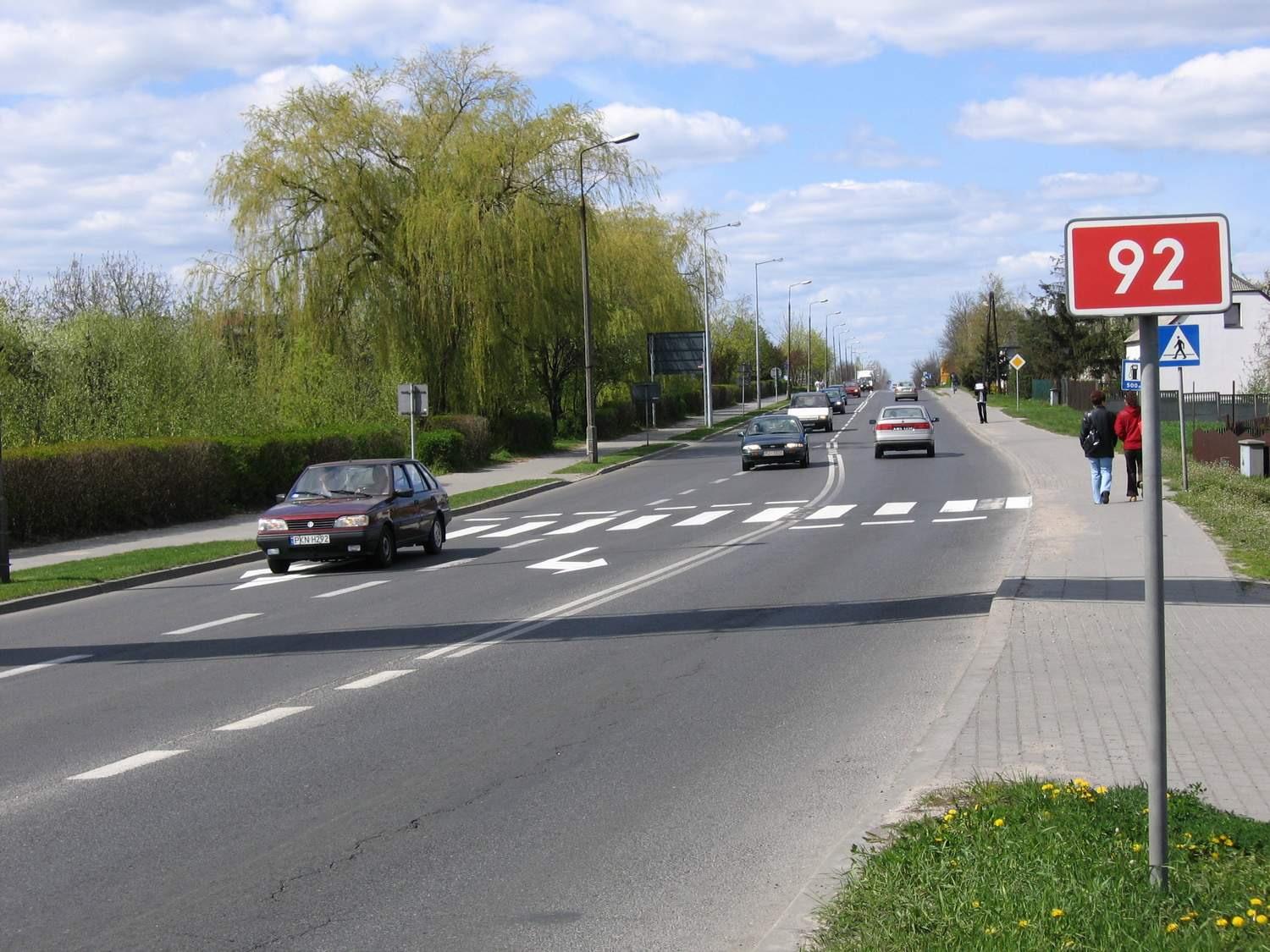 Droga krajowa numer 92, Słupca (foto. Marcin Majdecki)